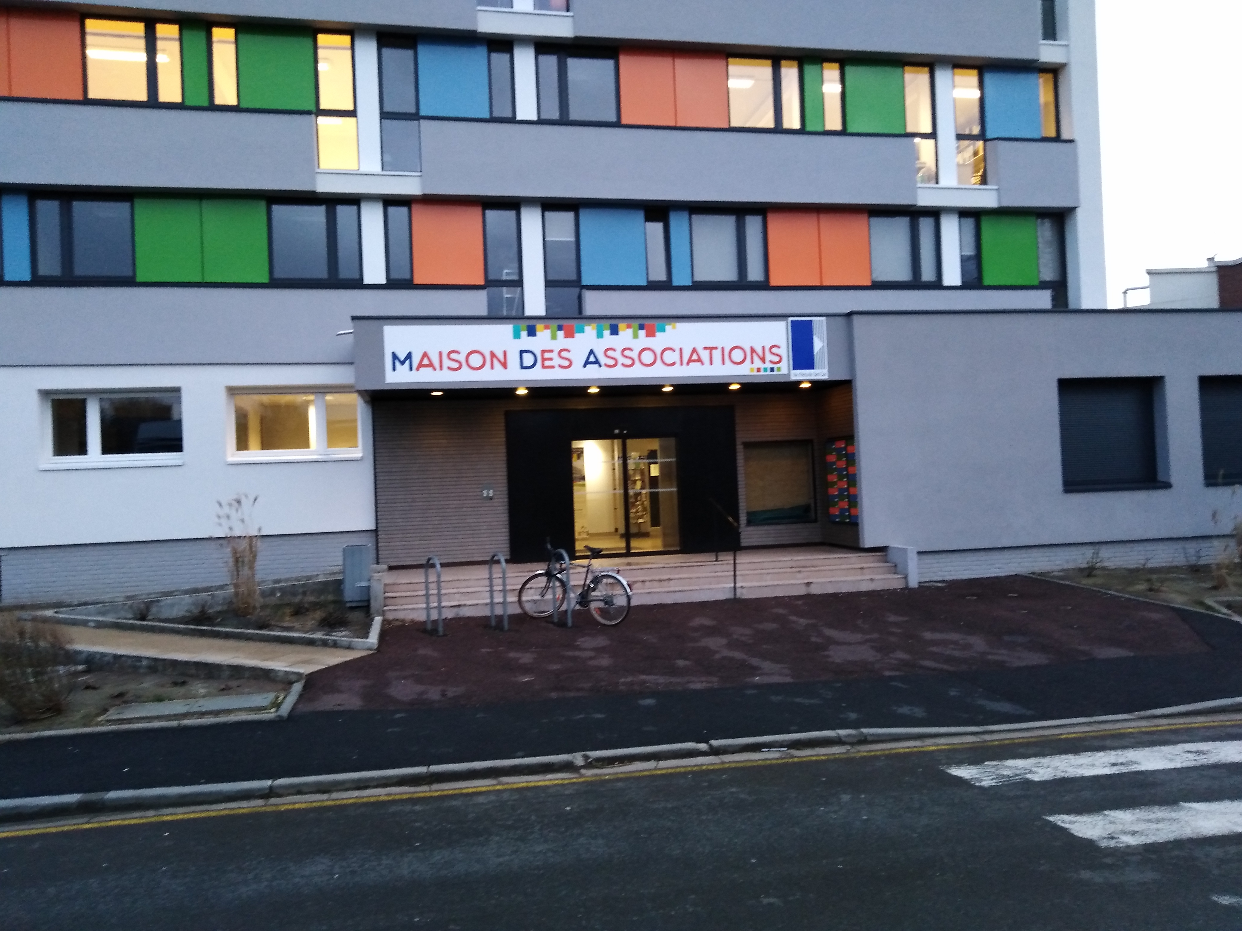 Domo de la Asocioj, Hérouville-Saint-Clair, Kvartalo Grand-Parc